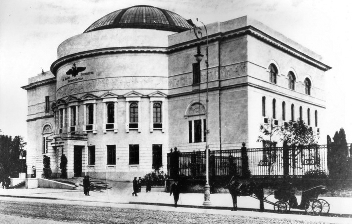 Педагогічний музей імені цісаревича Олексія 1909-1911 роки, де працювала Українська Центральна Рада (у сучасності — Будинок учителя. Київ)